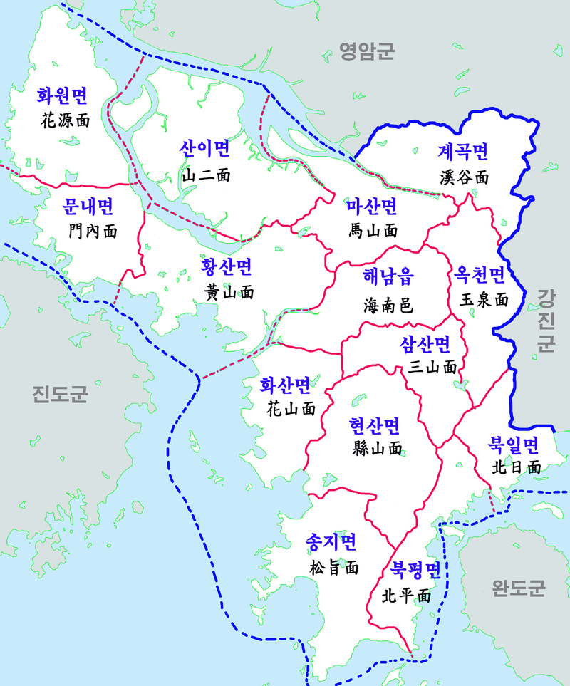 전남 해남군 행정구역도